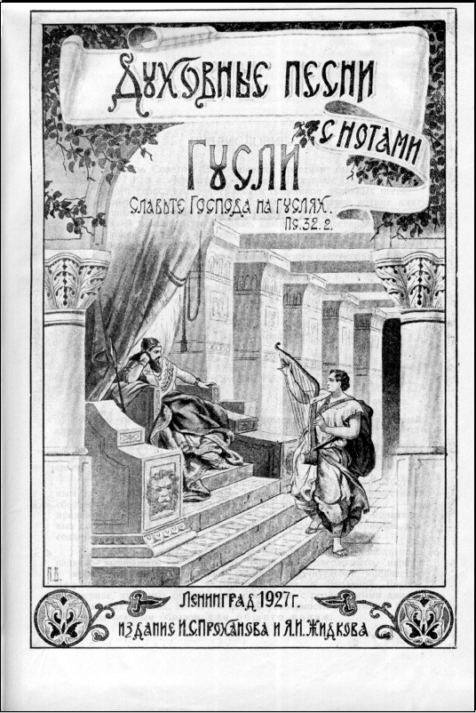 Обложка сборника евангельских псалмов "Гусли", 1928 год